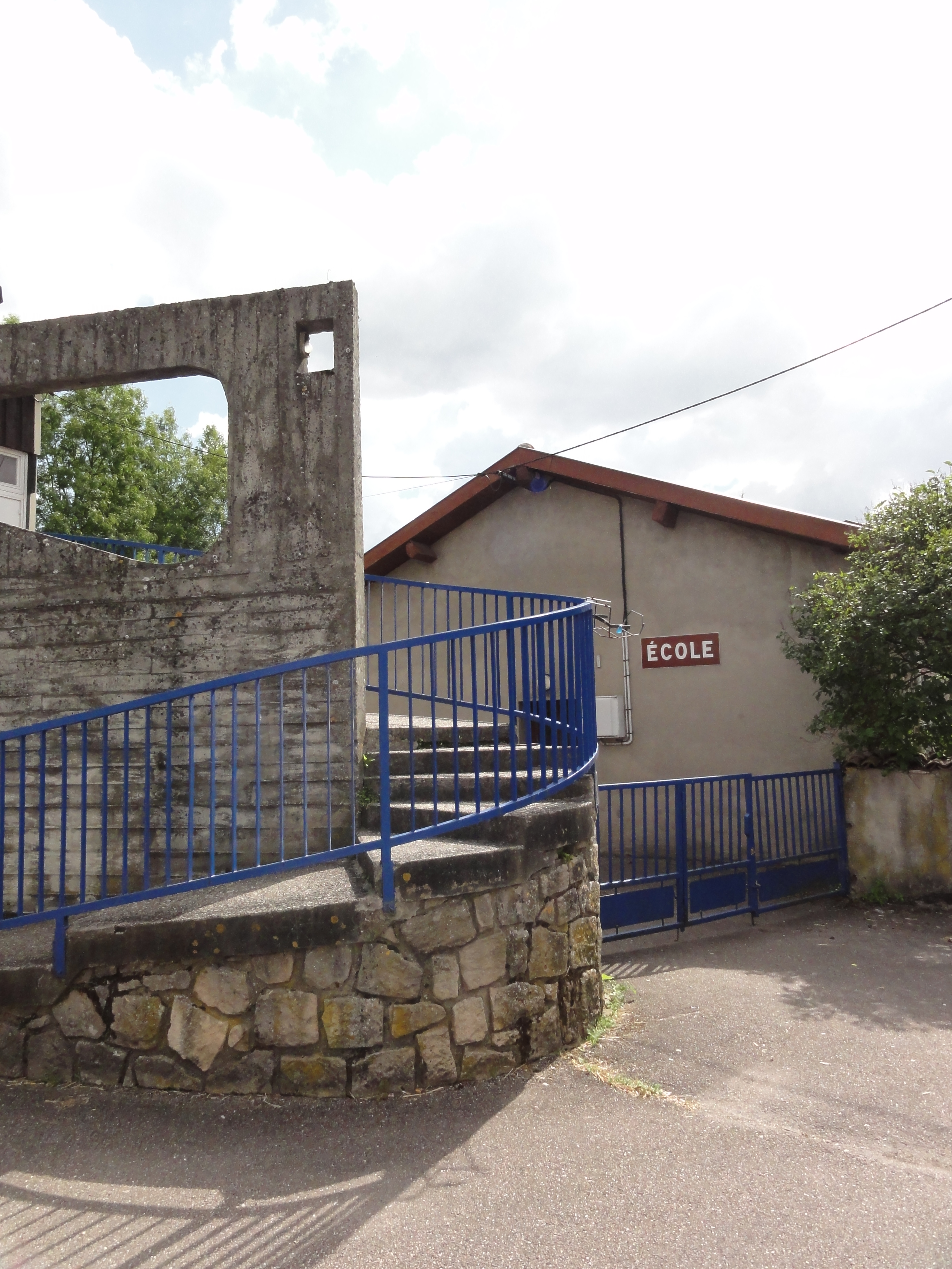 Loisey (Meuse) école